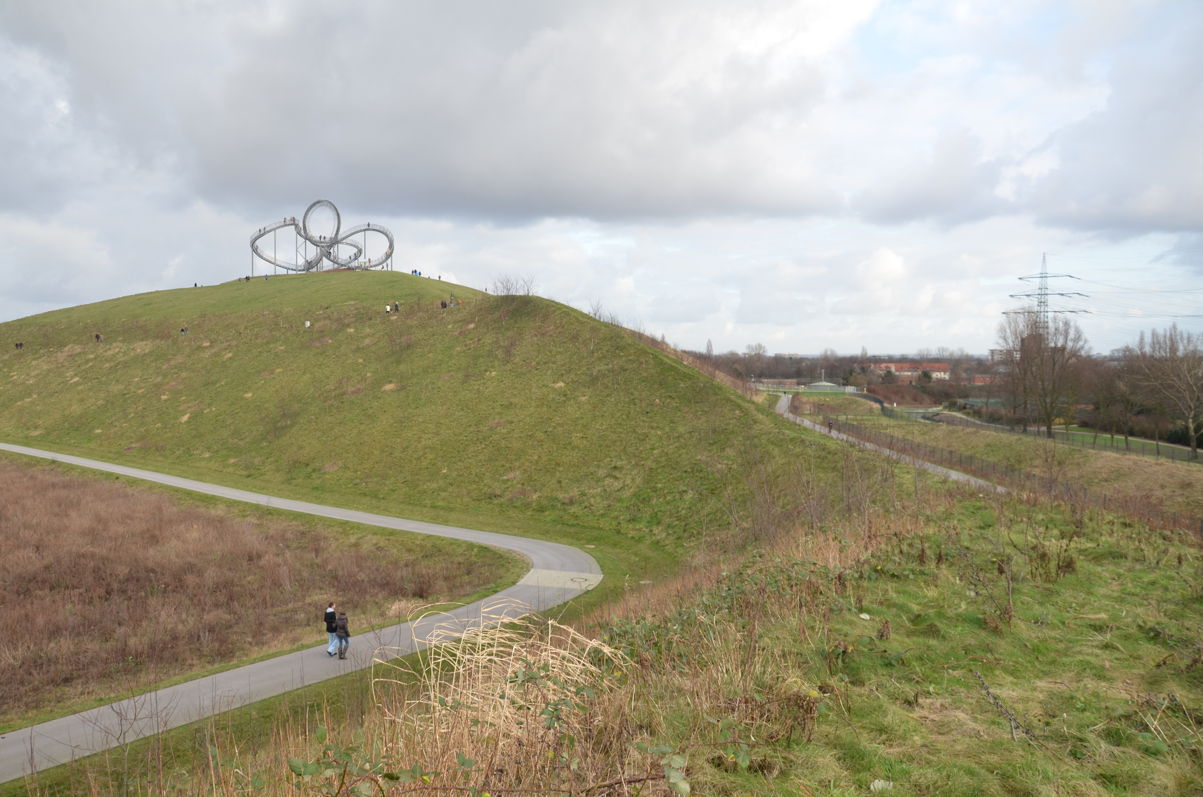 Tiger&Turtle Anfang 2012 auf der Heinrich-Hildebrand-Höhe im Angerpark in Duisburg. rechts der Angerbach mit Regegnrückhaltebecken